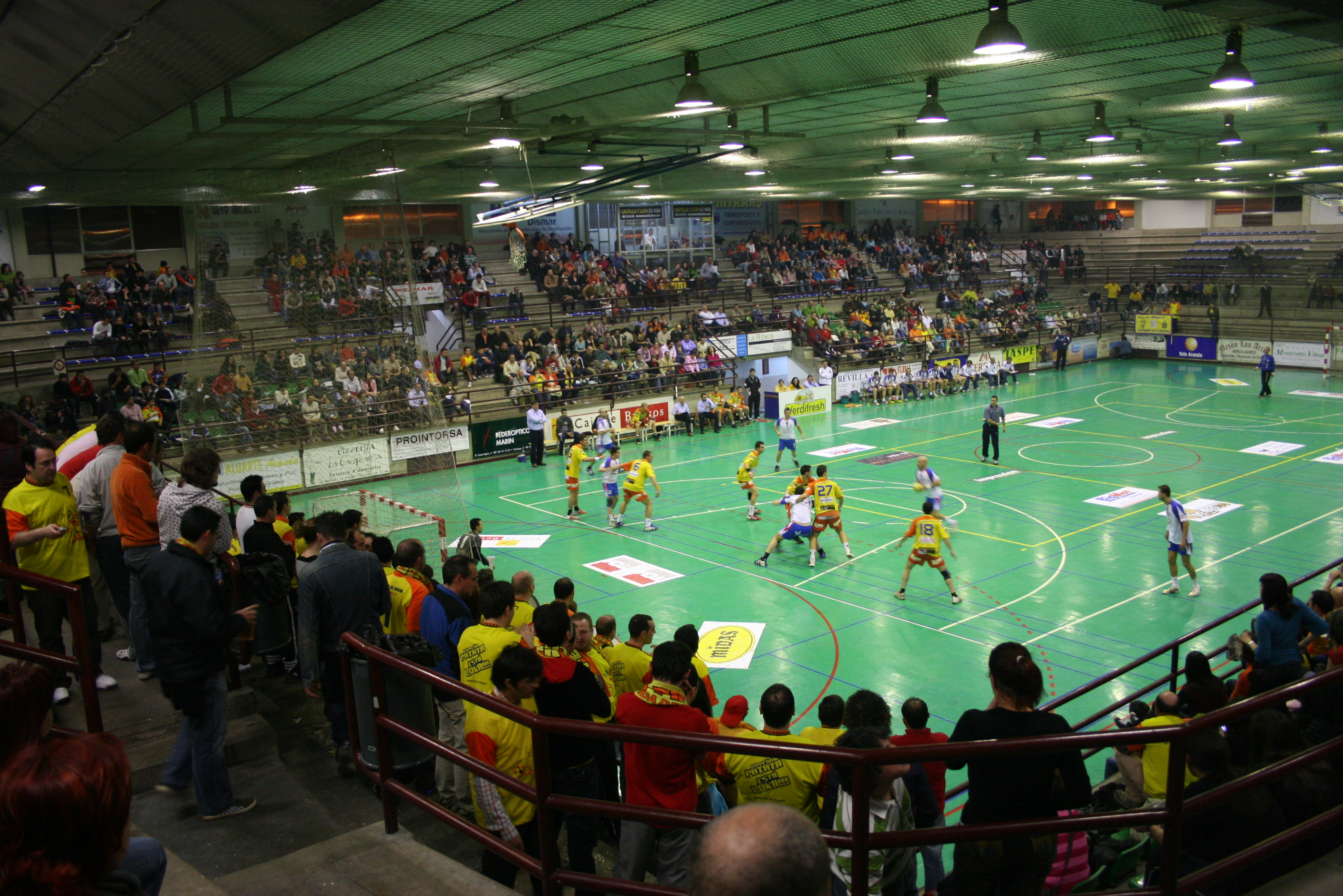 Instánea tomada durante el partido de balonmano: BM Artepref Villa de Aranda y el Club Balonmano Almoradí Mahersol, en el polideportivo Príncipe de Asturias de Aranda de Duero (Burgos), durante un partido de División de Honor B.